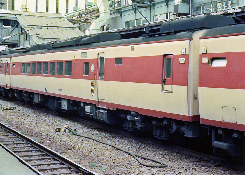 国鉄キハ183系特急形気動車 キロ182-5 札幌駅